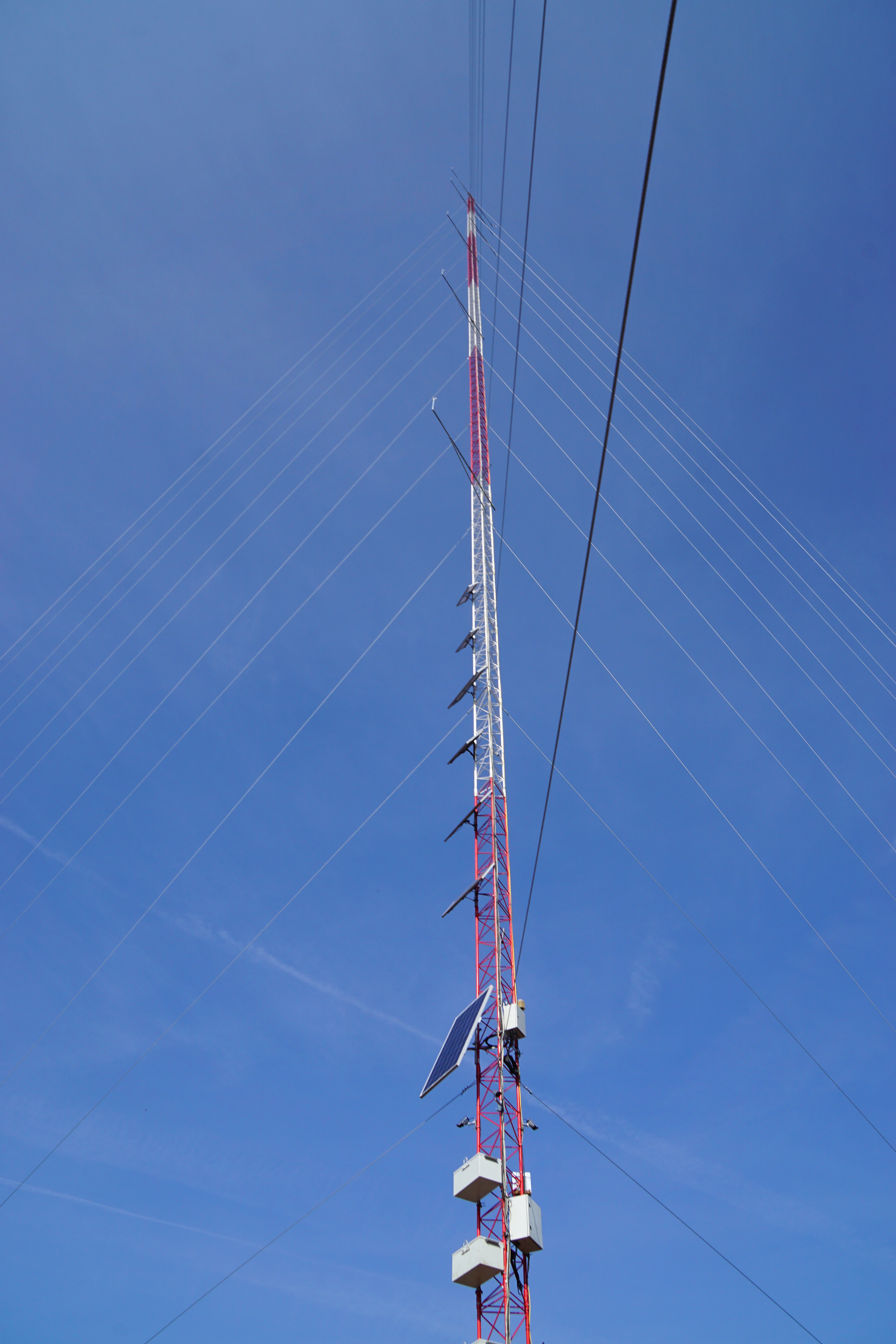 Le mât de mesure manométrique, préfigurant le projet de parc éolien du dôme haut-saônois, autour de Saulnot. Il est implanté à Granges-le-Bourg et domine Malval.